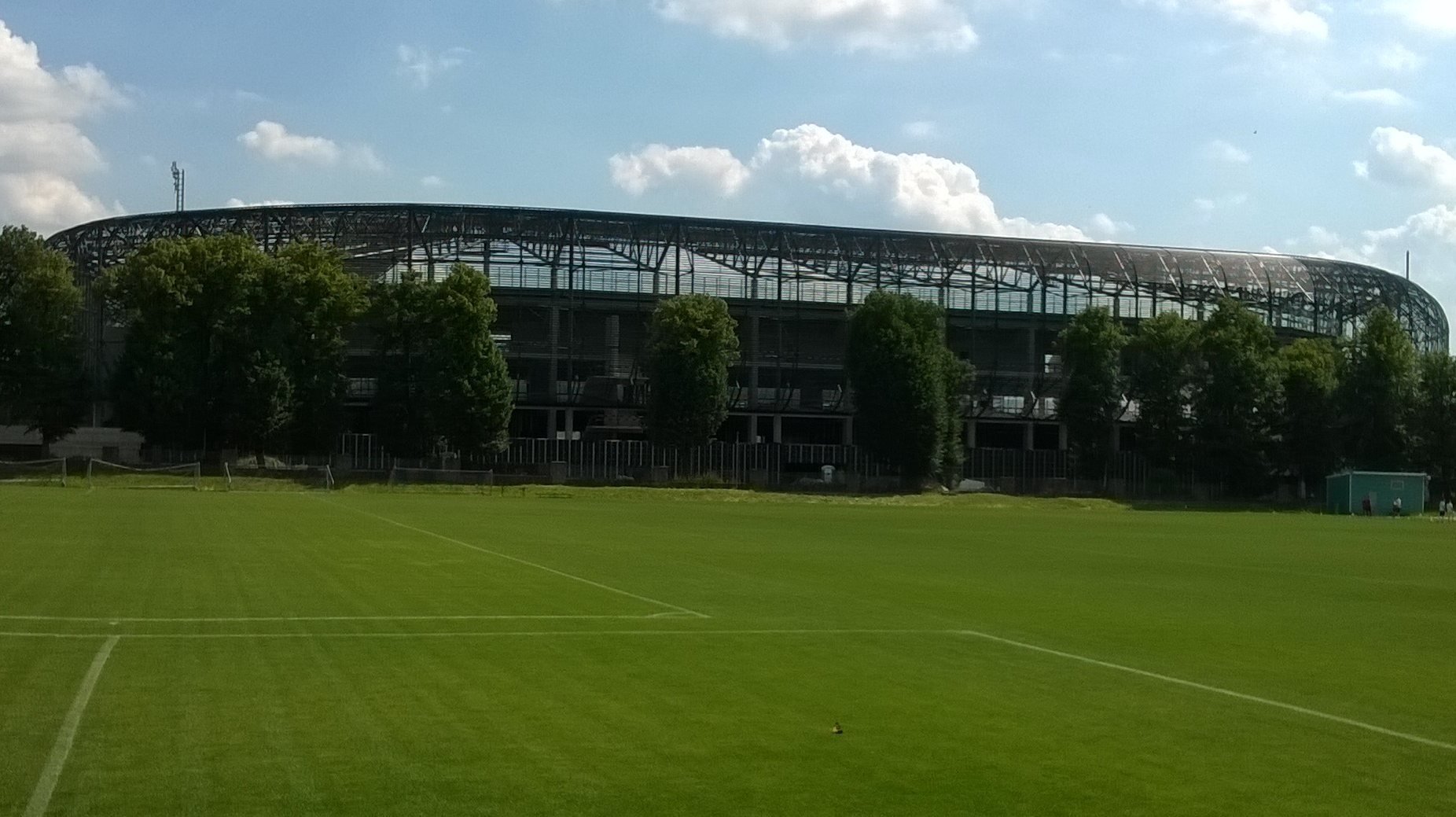 Stadion im. Ernesta Pohla w trakcie przebudowy, stan na dzień 27 VI 2014. Widok od strony ulicy Chłopskiej.